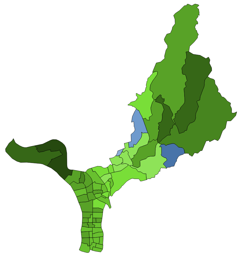 顏色對照表